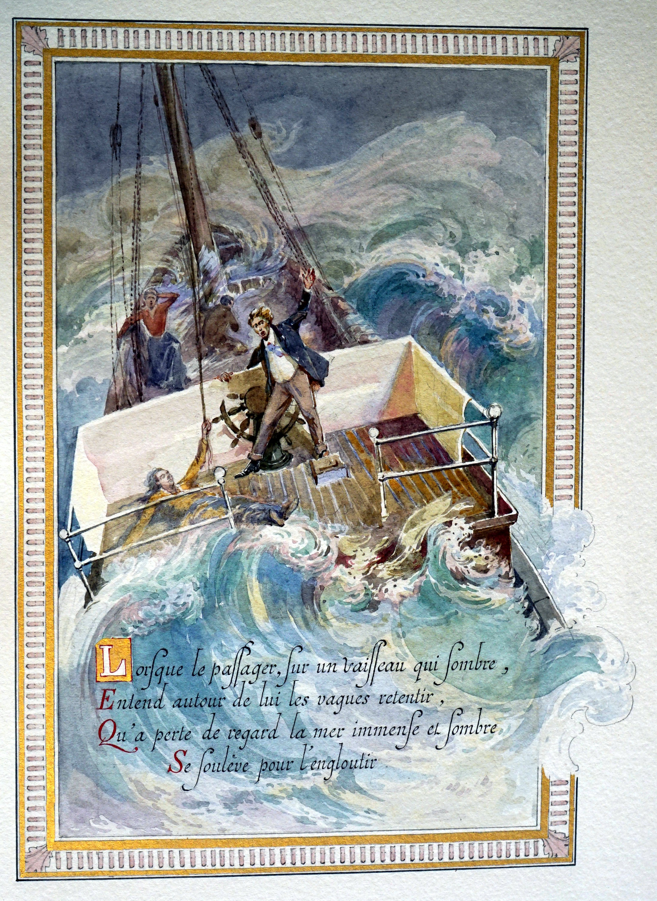 oeuvre calligraphiée et décorée par Auger pour Diancourt.